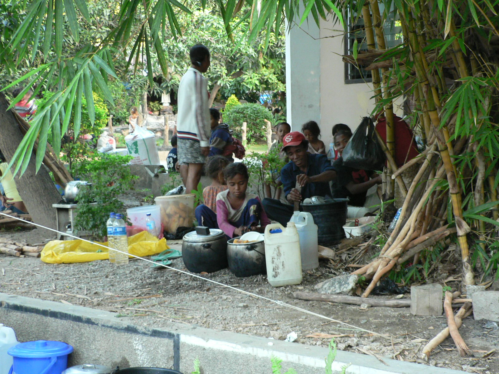 IDP camp Dili